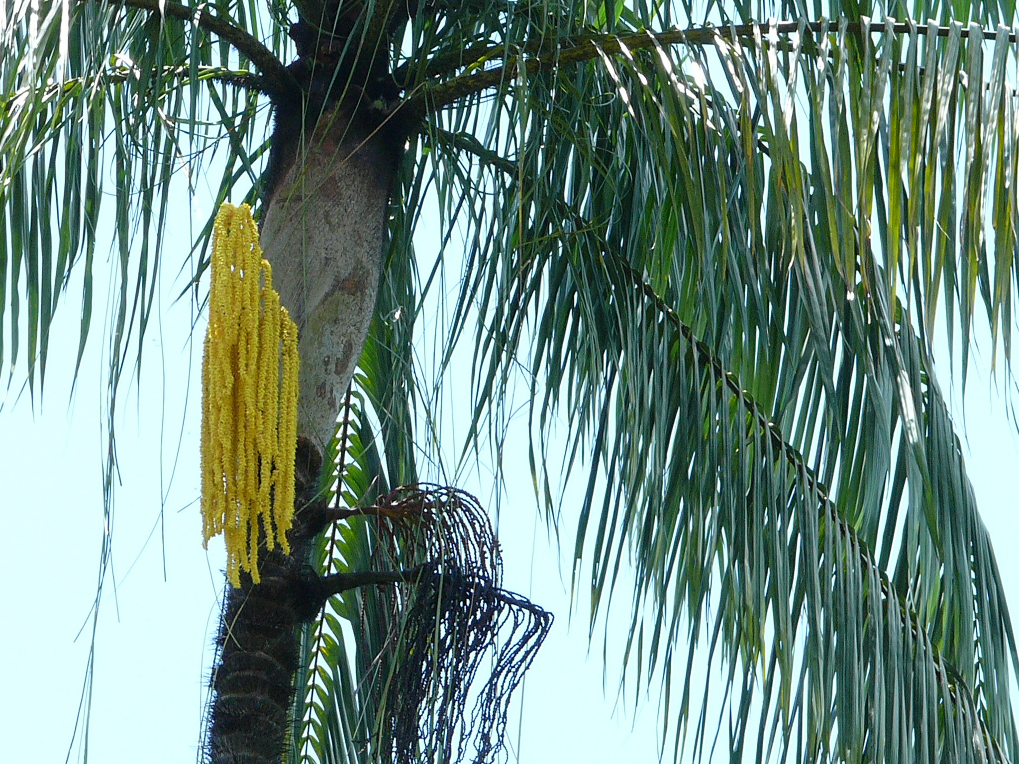 Bako NP, Sarawak, MALAYSIA